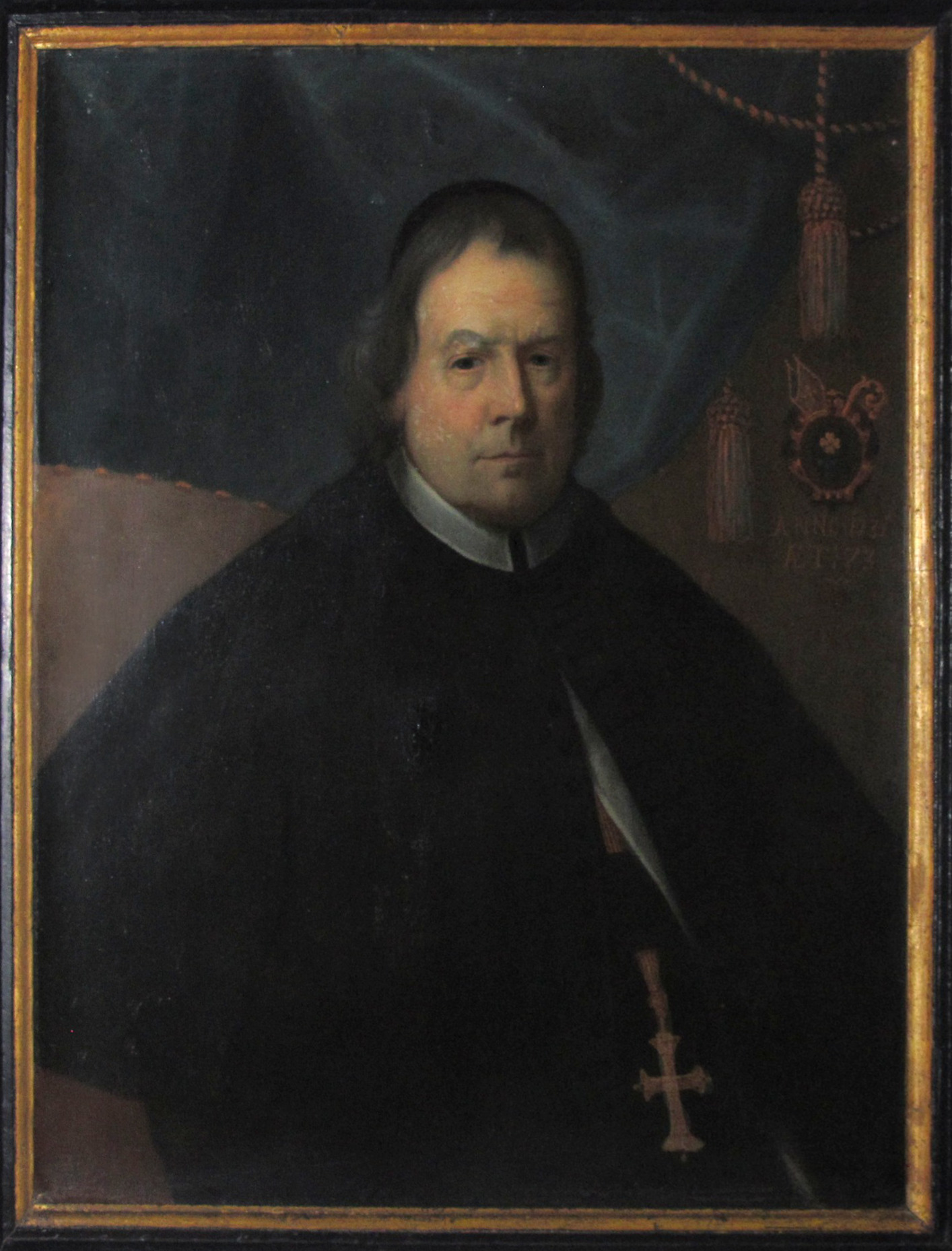 Nikolaus Heyendal, (* 1. September 1658 in Walhorn; † 5. Mai 1733 in Klosterrath) 1695 erster Pastor der Pfarre Eupen, 1706 bis 1733 Prior und Abt von Rolduc